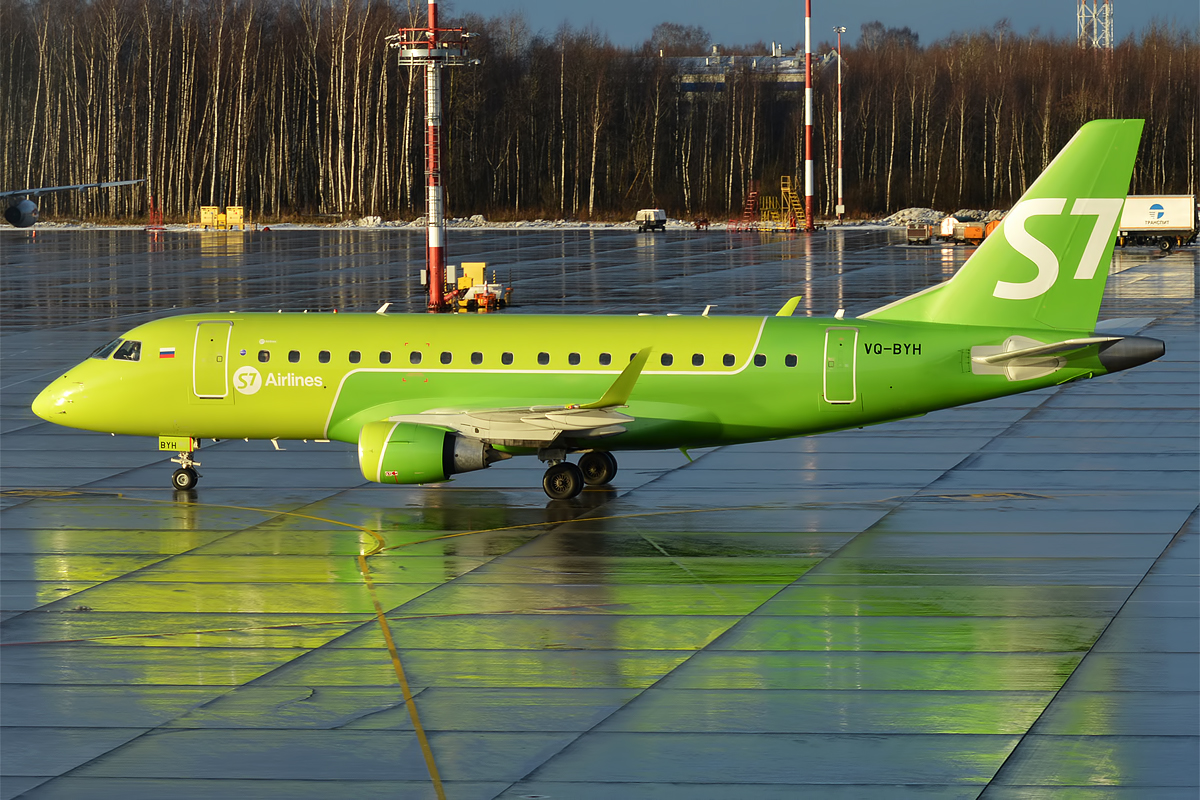 S7 Airlines, VQ-BYH, Embraer ERJ-170SU